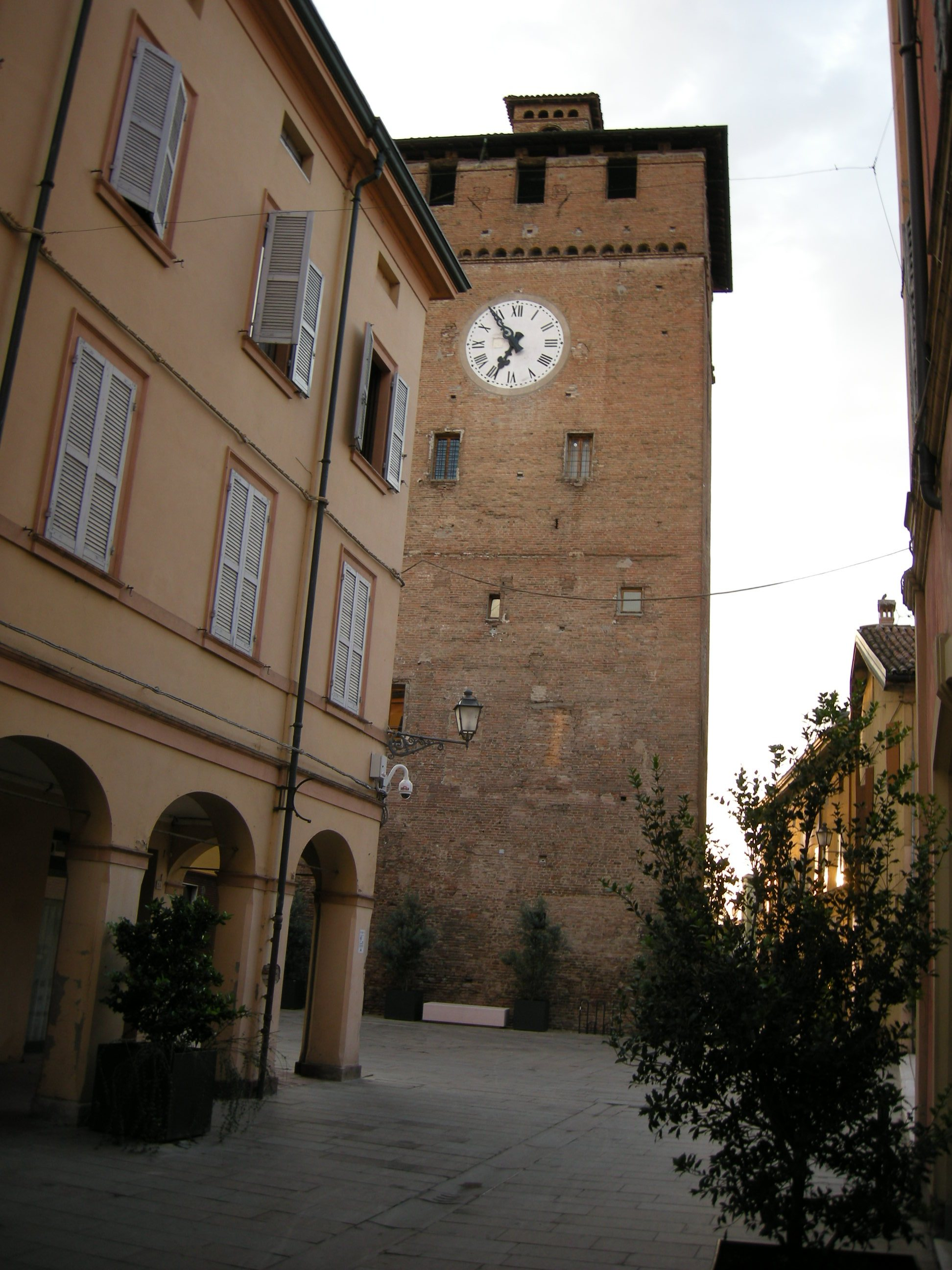 Nonantola, torre dei modenesi